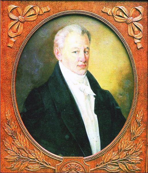 Котляревський Іван Петрович: Котляревський Іван Петрович